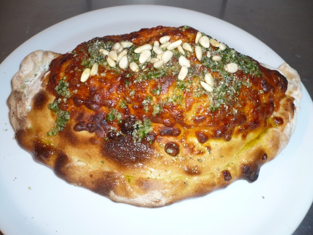 PIZZA-BRAISES Theix 56450 France